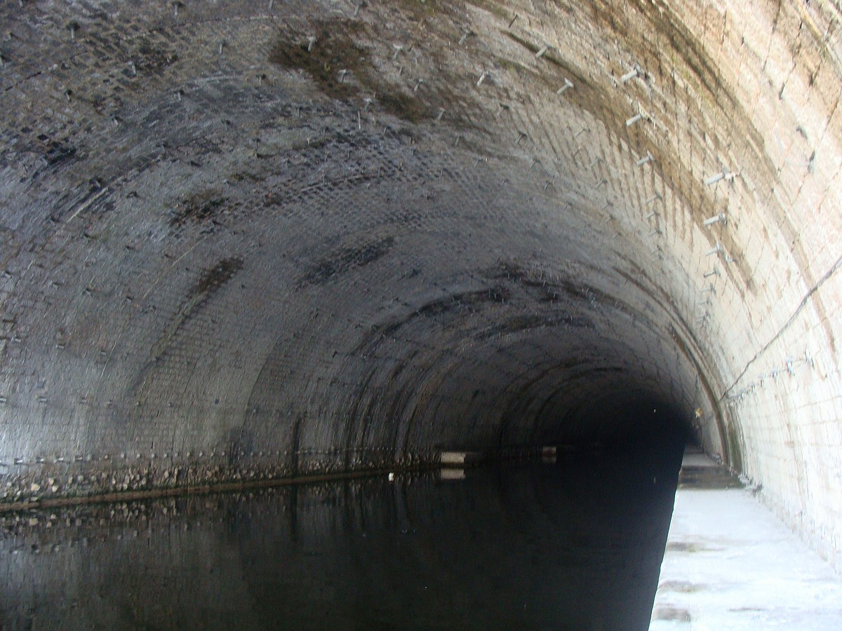 Le tunnel du Rove, vue rapprochée de la galerie, côté Marignane.